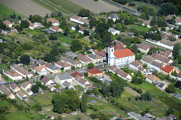 Adásztevel légi fotó, Református templom, barokk, ép. 1753, azonosító: 9521 (törzsszám: 5031). - Veszprém m., Adásztevel, Árpád u.